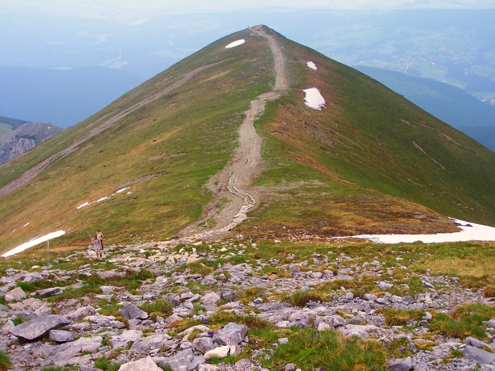 Twarda Kopa w masywie Ciemniaka (West Tatra Mountains)